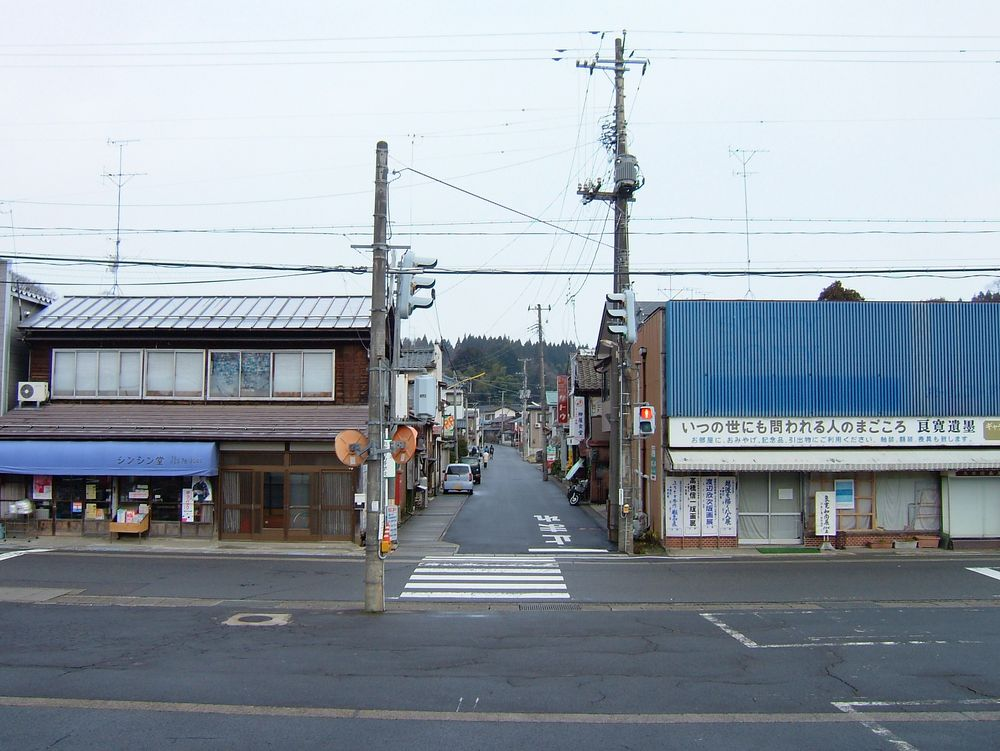 越後線 出雲崎駅の駅前風景。